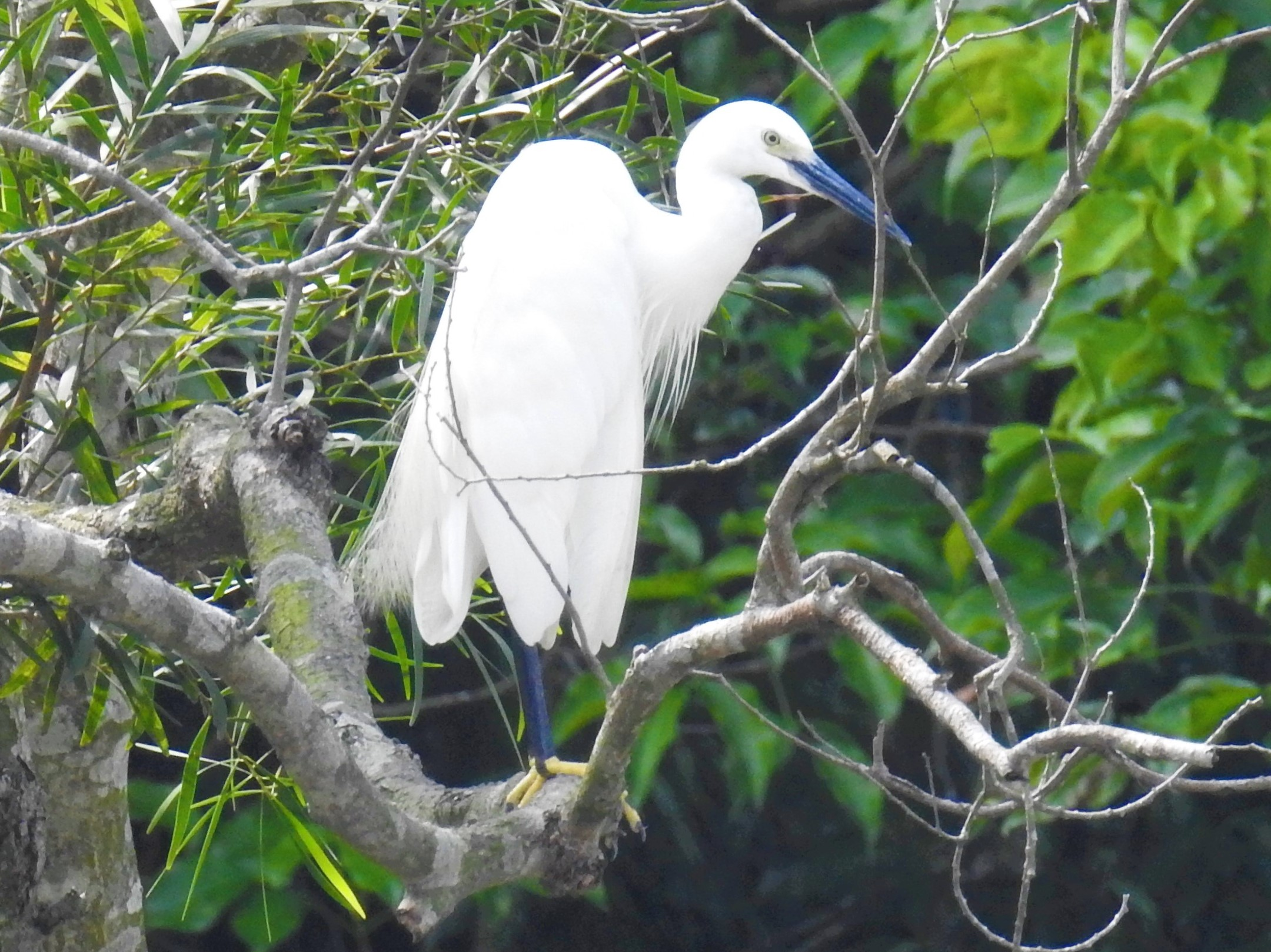 一隻藍喙、藍腿的小白鷺